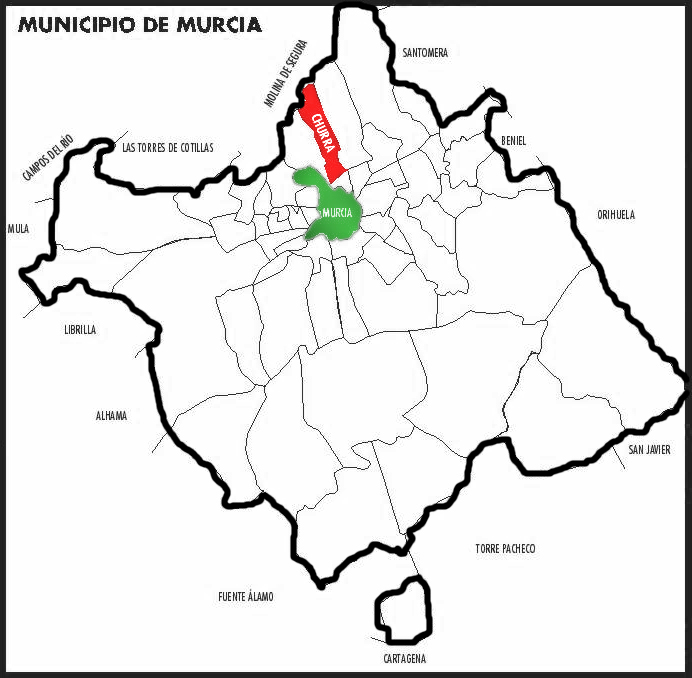 Plano de situación de Churra